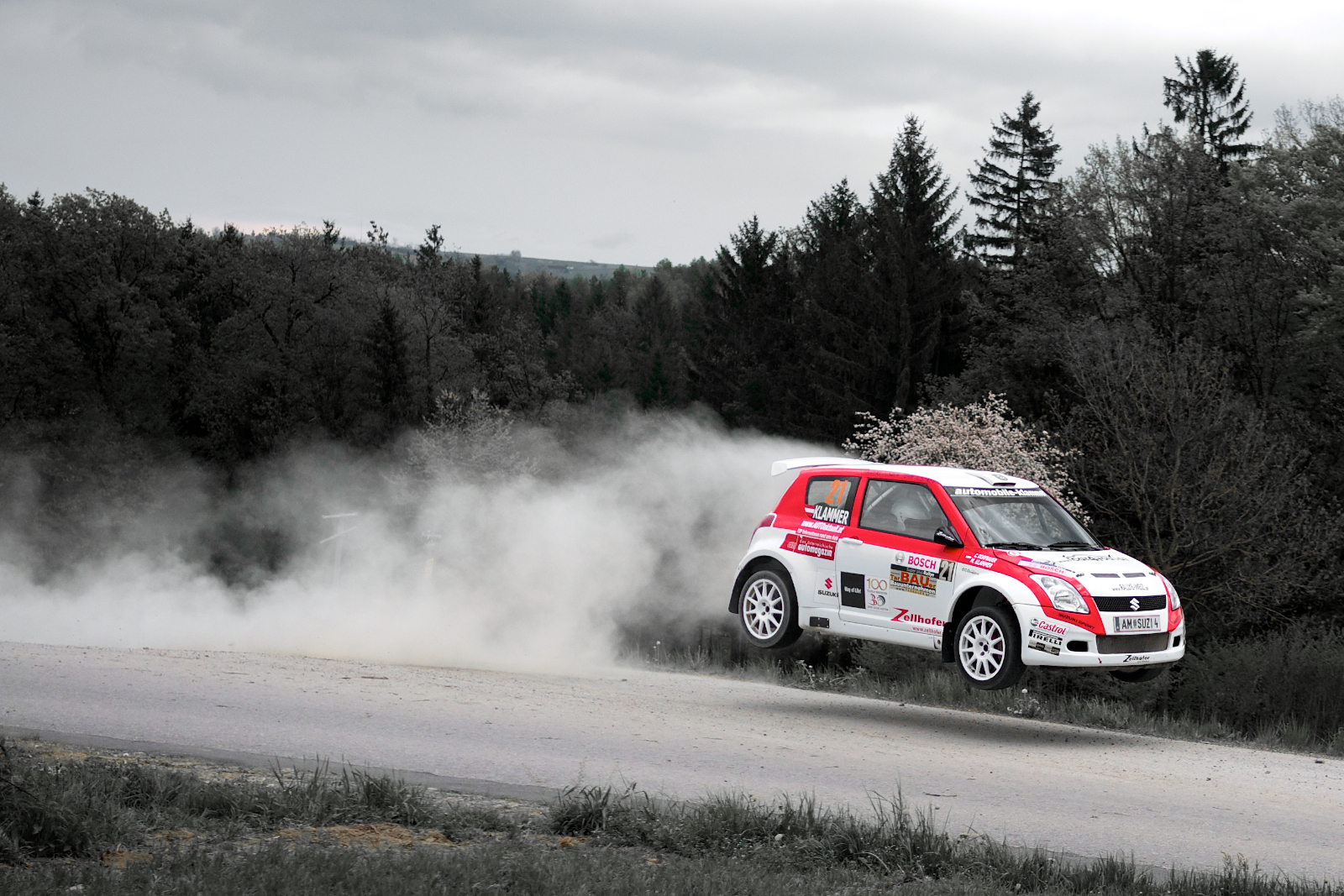 Bosch Rallye 2010 Pinggau